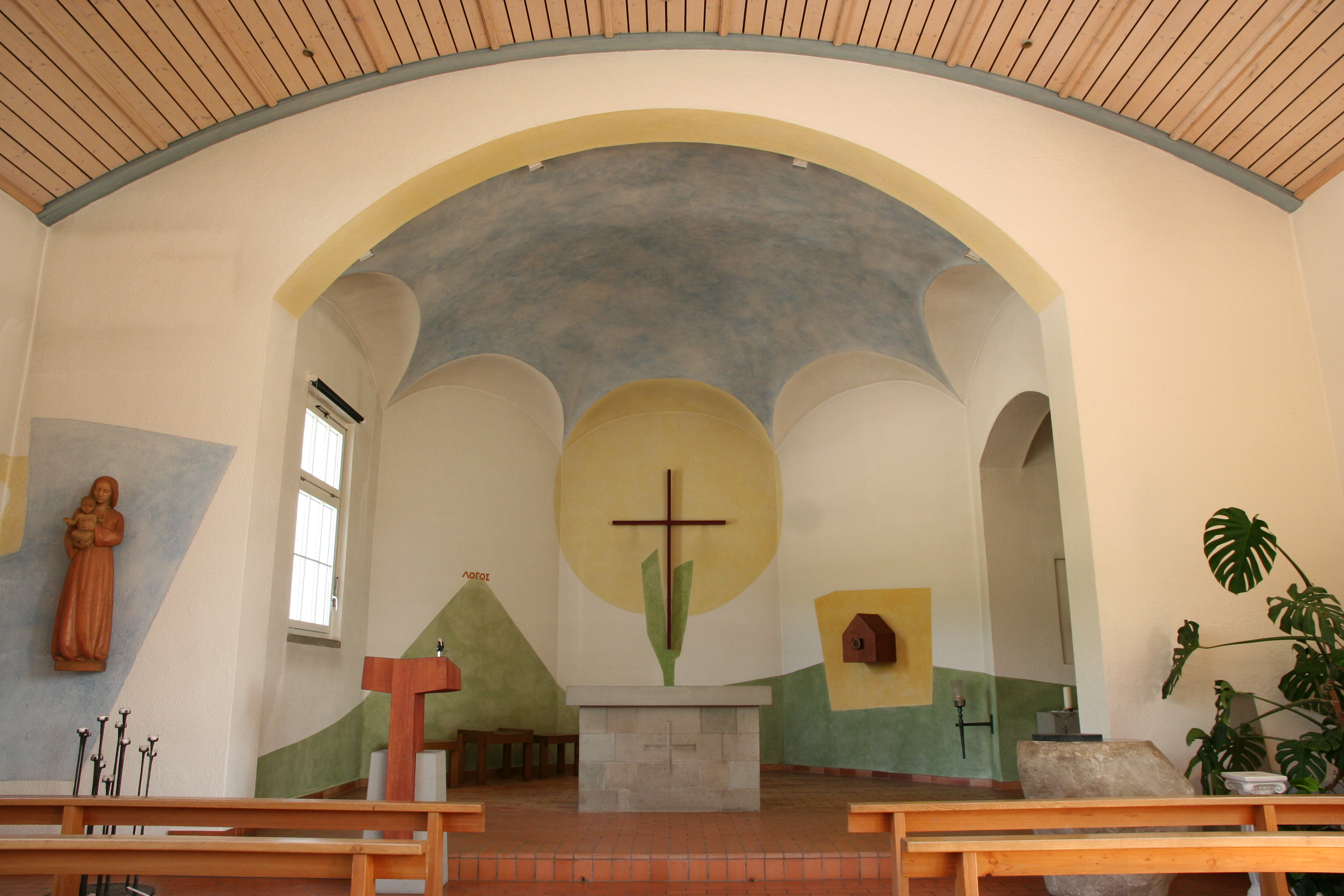 Römisch-katholische Pfarrkirche St. Josef Glattfelden, Gesamtgestaltung und Kunstwerke von Alois Spichtig